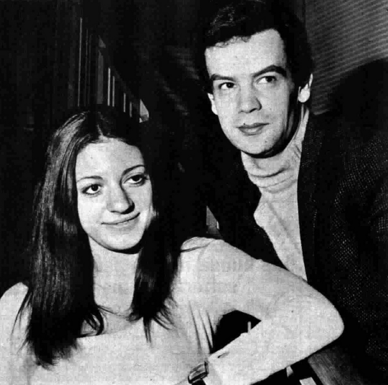 Italian actors Ludovica Modugno and Piero Sammataro